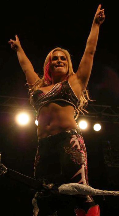 Natalya Neidhart